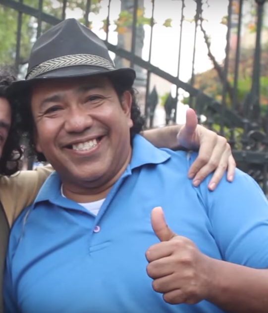 Héctor Garzón en la Marcha contra la TV Basura, siendo entrevistado por Felipe Crespo. La imagen es tomada de una fotografía al momento de la entrevista con Felipe Crespo para YouTube. Aquí el enlace del video, donde en la descripción se explica la licencia de la imagen.